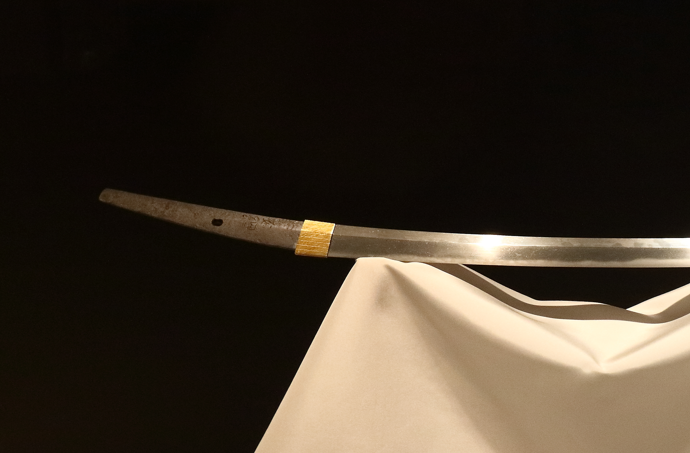 太刀。伯耆安綱（名物 童子切安綱）、銘「安綱」（国宝）。平安時代10～12世紀。